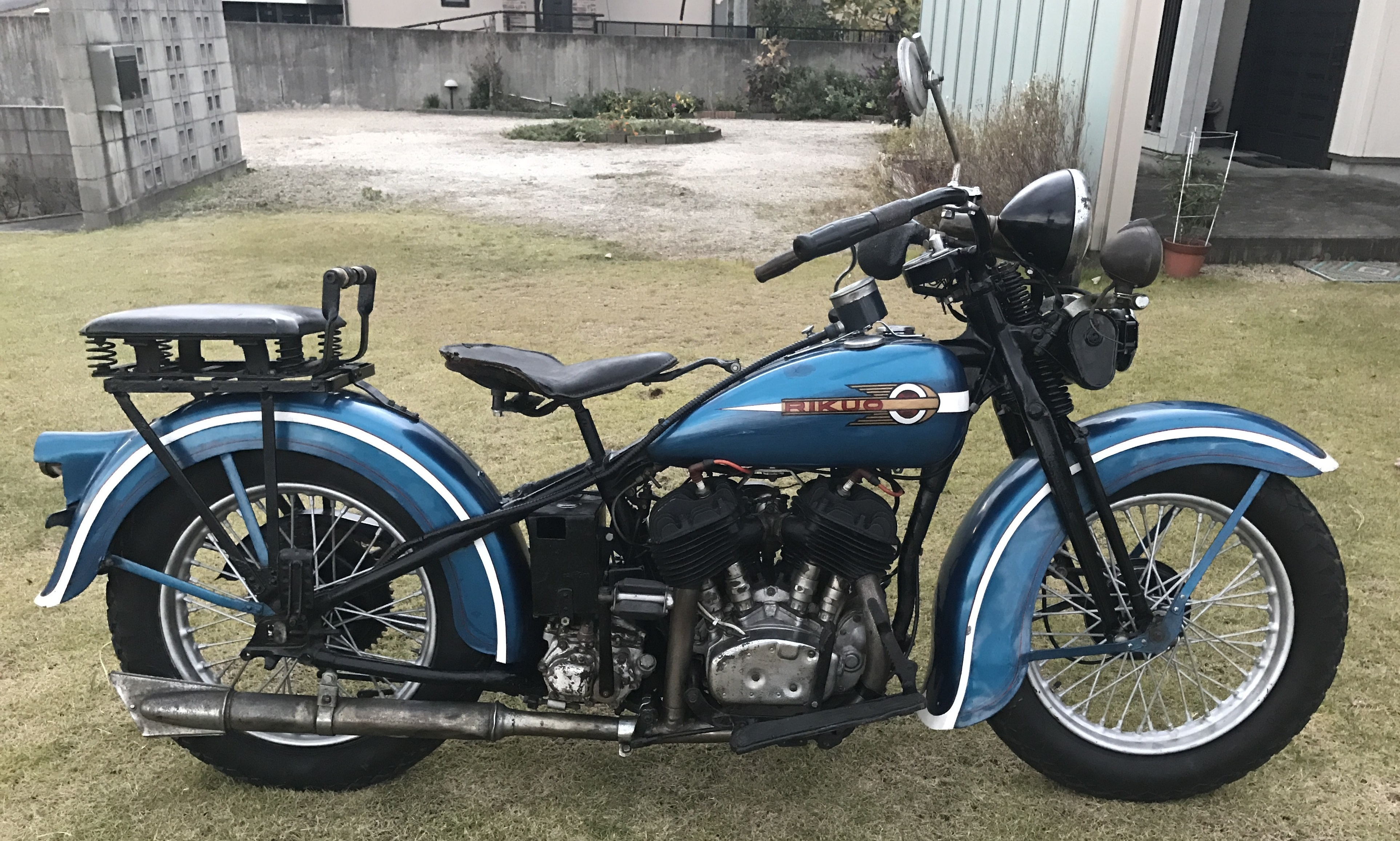 陸王 1200VFD 1950年